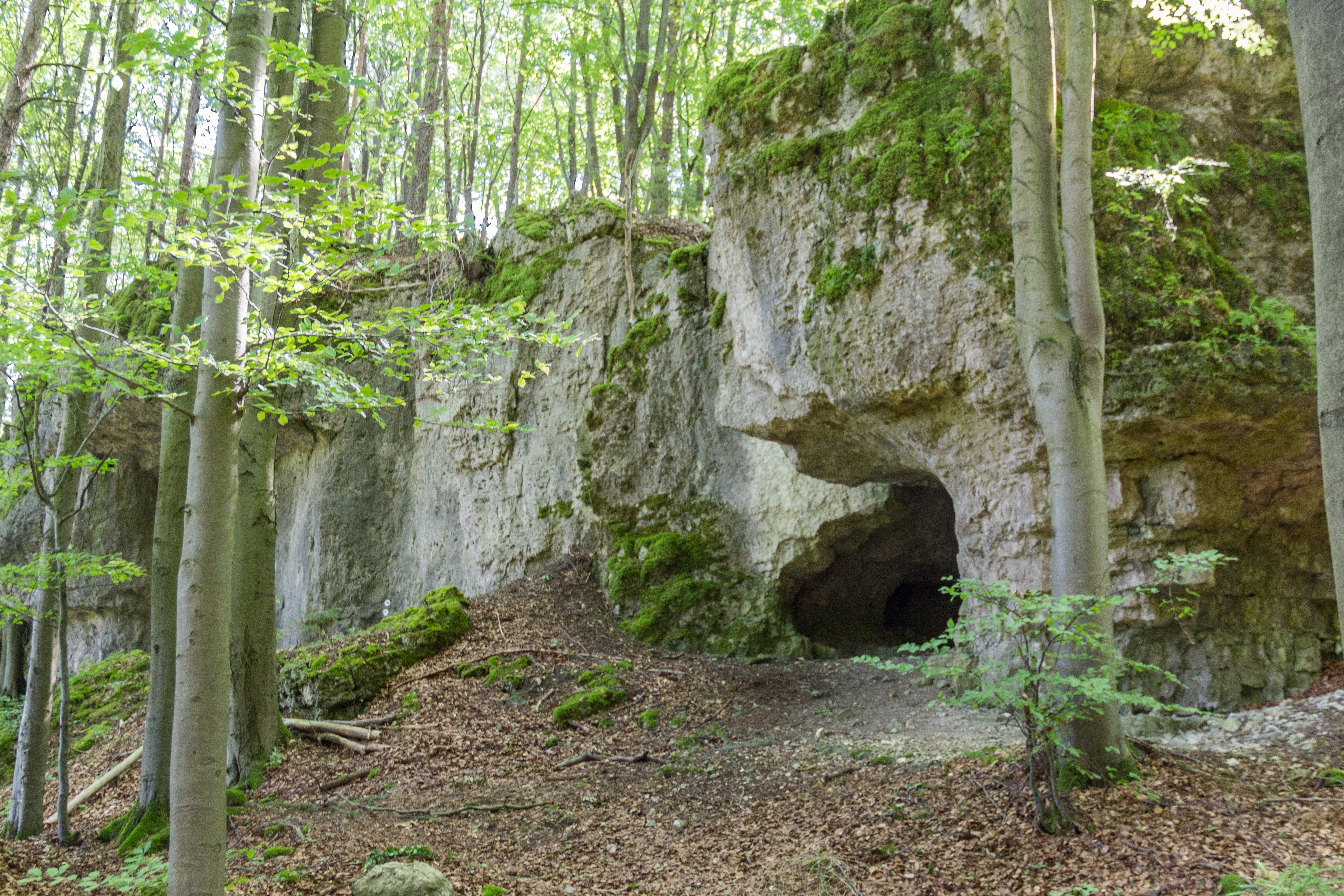 Dolomitfelsen, Lockenricht, Scheckenfelsabri (A 146b) links im Bild, rechts Scheckenfelshöhle (A 146a)